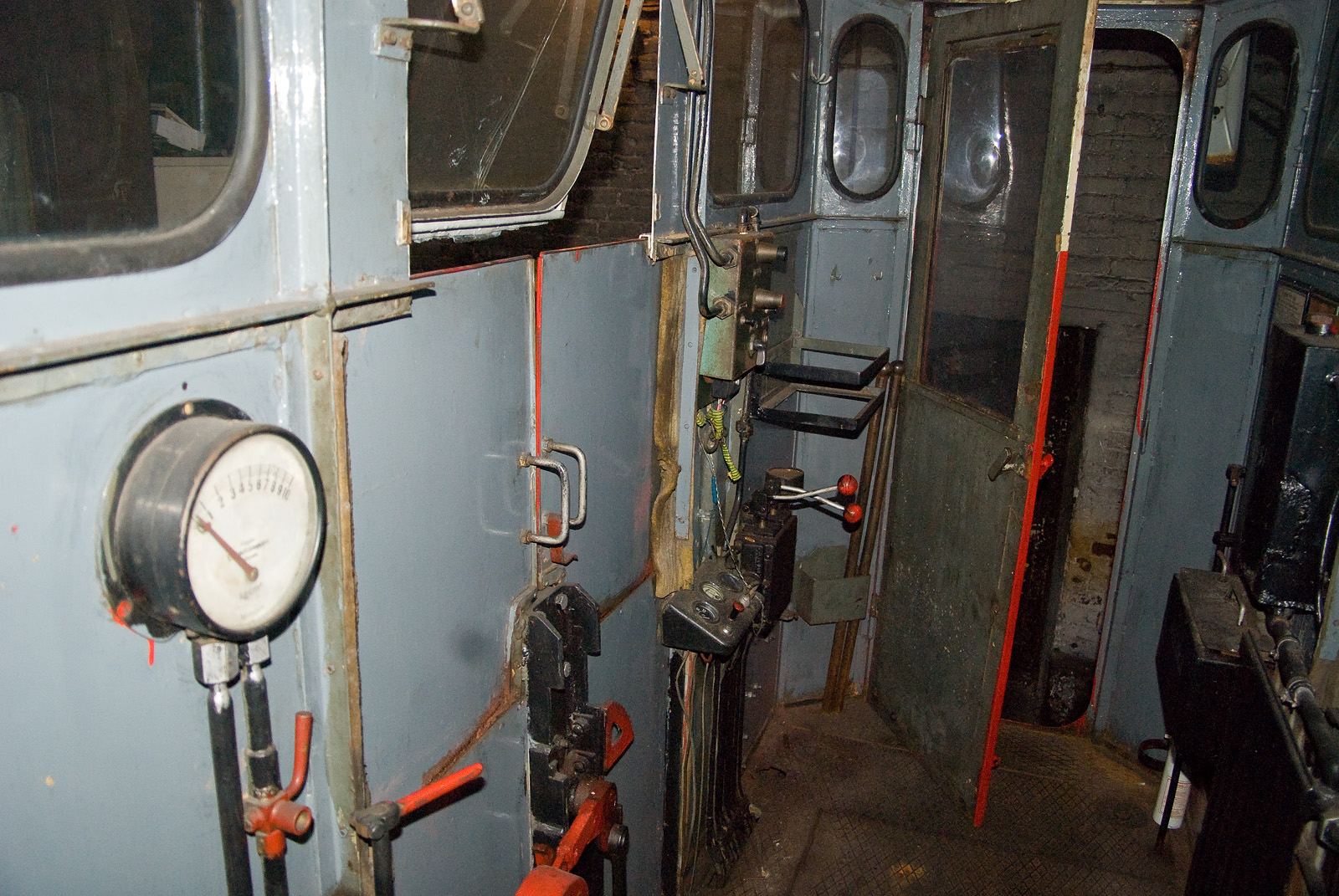 Tampellan valmistaman toisen valmistussarjan Kisko-Kalle -raidetraktorin ohjaamoa.